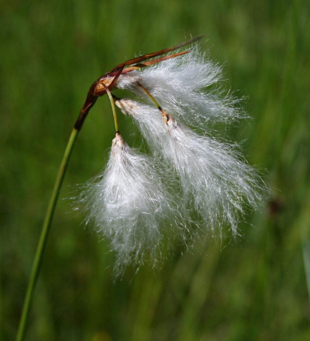 Schmalblatt-Wollgras (Eriophorum angustifolium), Sauergräser (Cyperaceae) - Österreich/Austria/Autriche: Oberösterreich, Hausruckviertel, Moorwiese ca. 2 km S Forsthaus Redltal, ca. 570 m s.m.